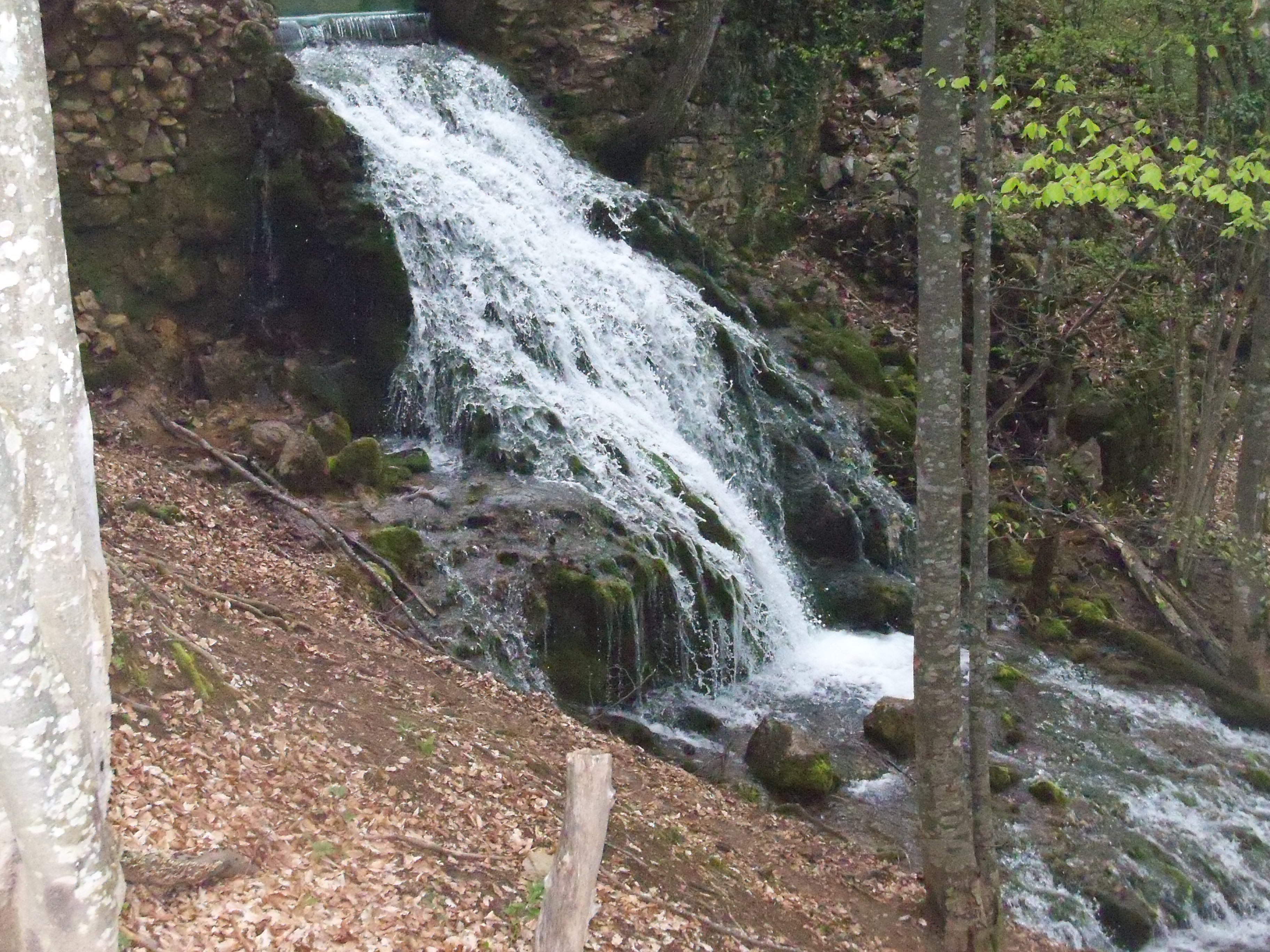 Водослив с Юсуповского пруда на реке Сары-Узень